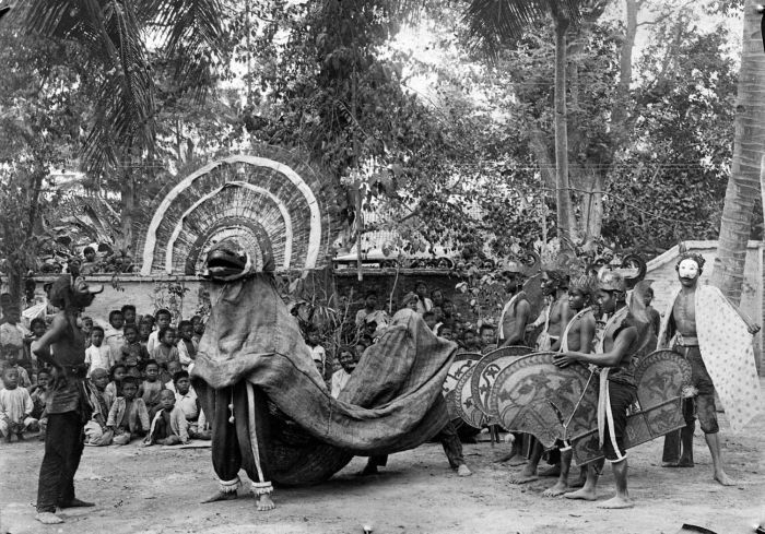 Repronegatif. Pertunjukan reog di Ponorogo pada sekitar tahun 1920-an. Penari bujangganong berdiri di sebelah kiri. Reog (atau Rajawana, "raja hutan") dimainkan oleh dua orang. Beberapa penari kuda kepang juga menyertai, lengkap dengan adegan kesurupan. Versi modern reog (rajawana) Ponorogo dimainkan oleh satu orang.